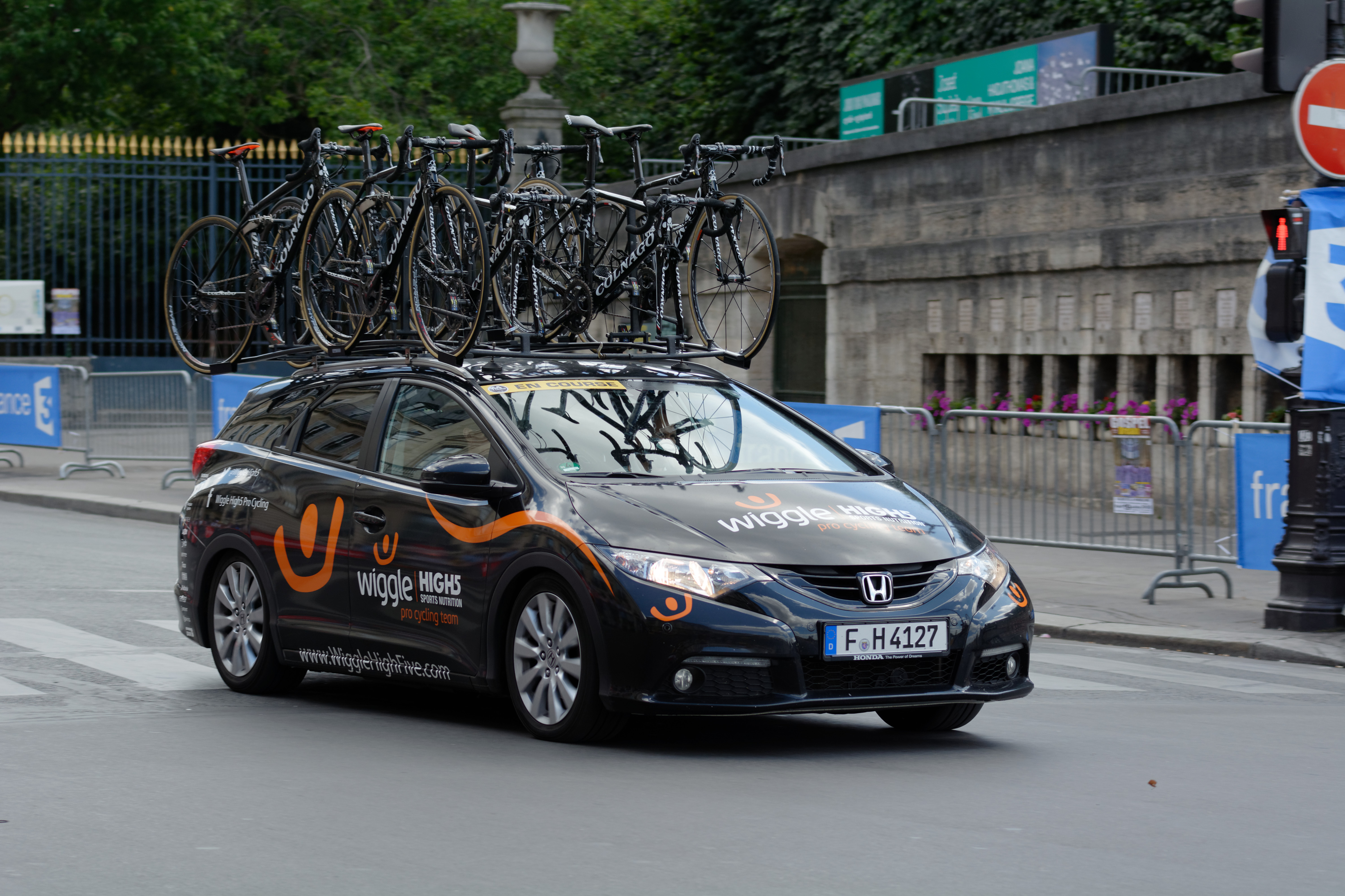 D71_9271_DxO